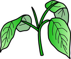 Un verticille est réalisé quand des organes sont insérés au même niveau sur un axe - créé par Patricia FIDI